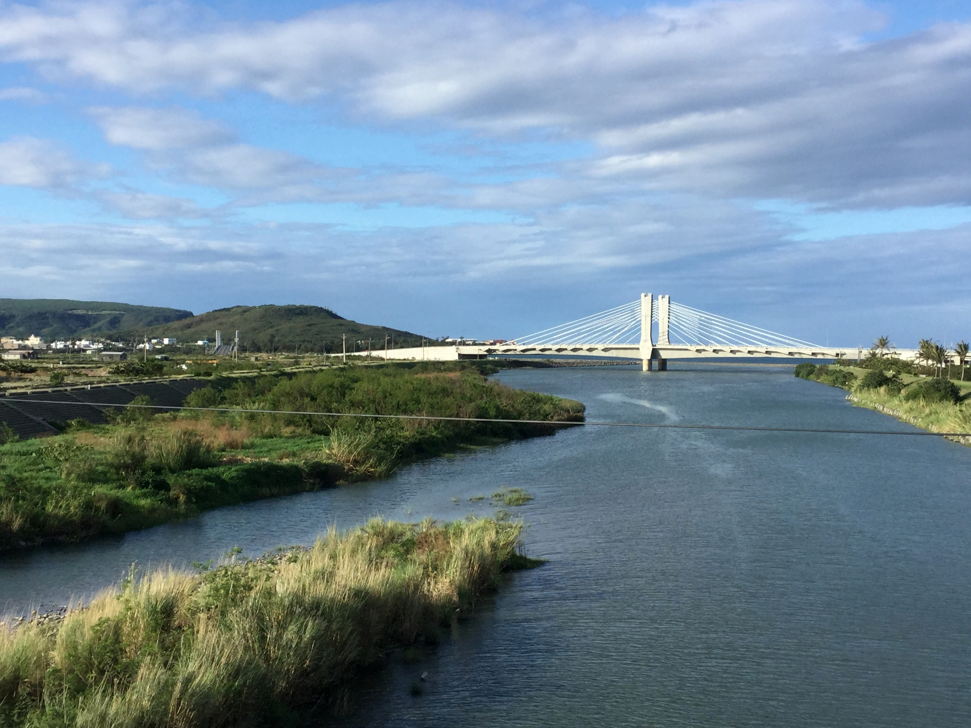 車城濱海景觀公路福安大橋拍摄從台26線